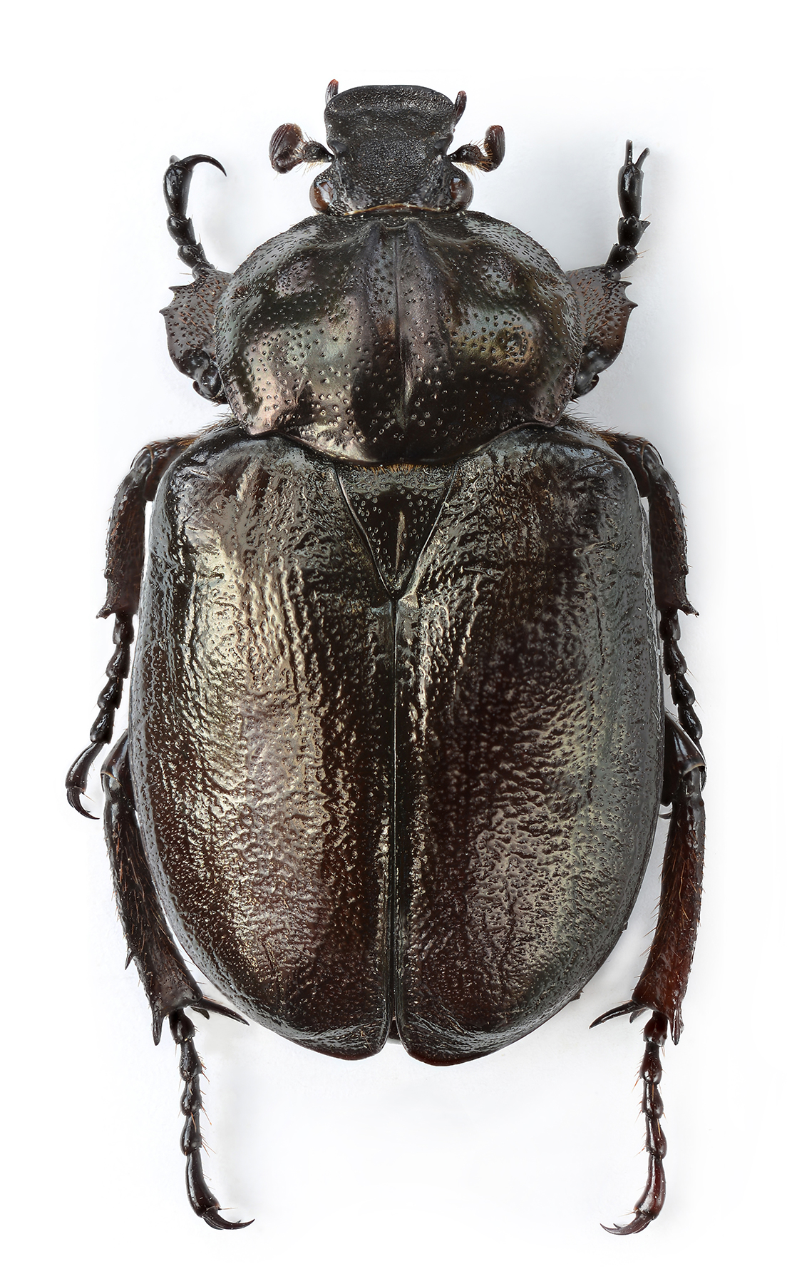 Osmoderma eremita